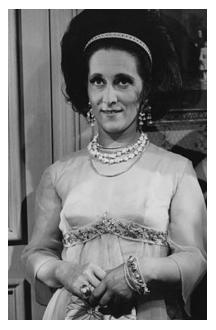 Noemí Manzano en una escena de la película La guita (1970).